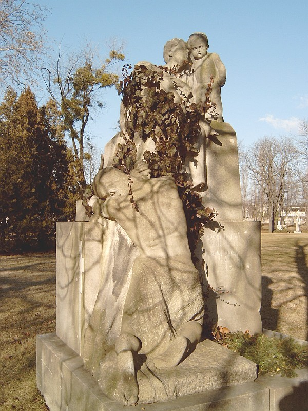 Rákosi Jenő, Kremsner (Acsád, 1842. nov. 12. – Bp., 1929. febr. 8.): író, újságíró, politikus sírja Budapesten. Kerepesi temető: 10-1-66 [szobrász: Horvay János].